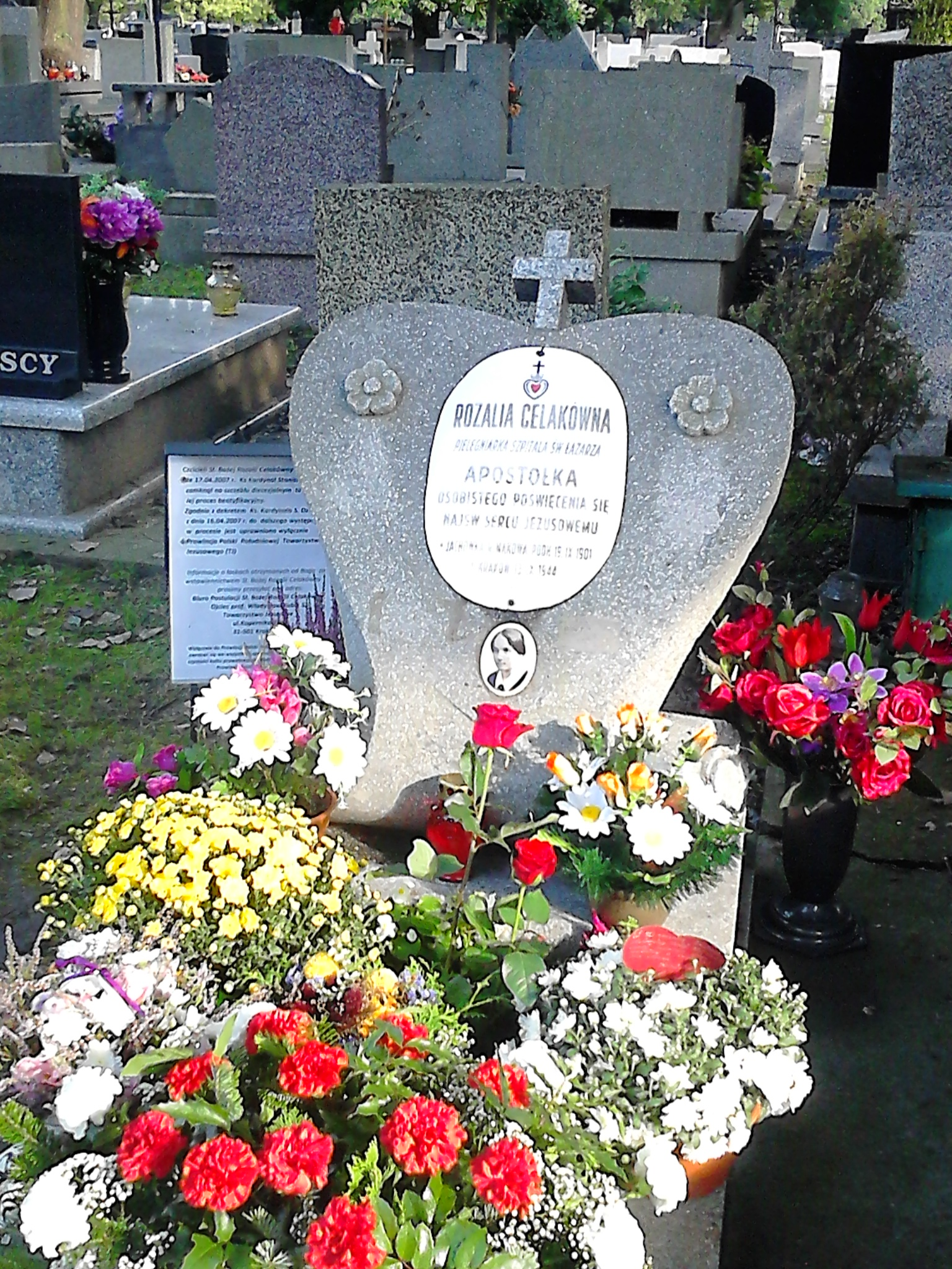 Grób Rozalii Celakówny. Cmentarz Rakowicki w Krakowie.